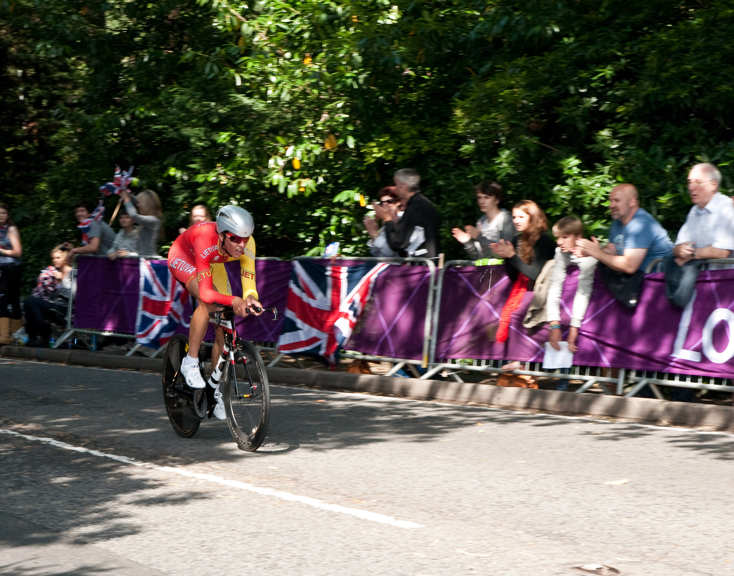 Ramunas Navardauskas - Lithuania